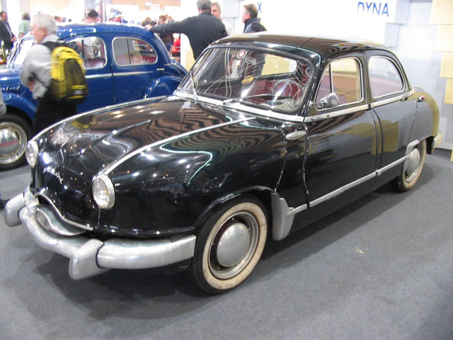 Photo personnelle d'une automobile Panhard Dyna Z1 prise lors du salon des automobiles anciennes à Lyon Eurexpo en novembre 2005. Licence